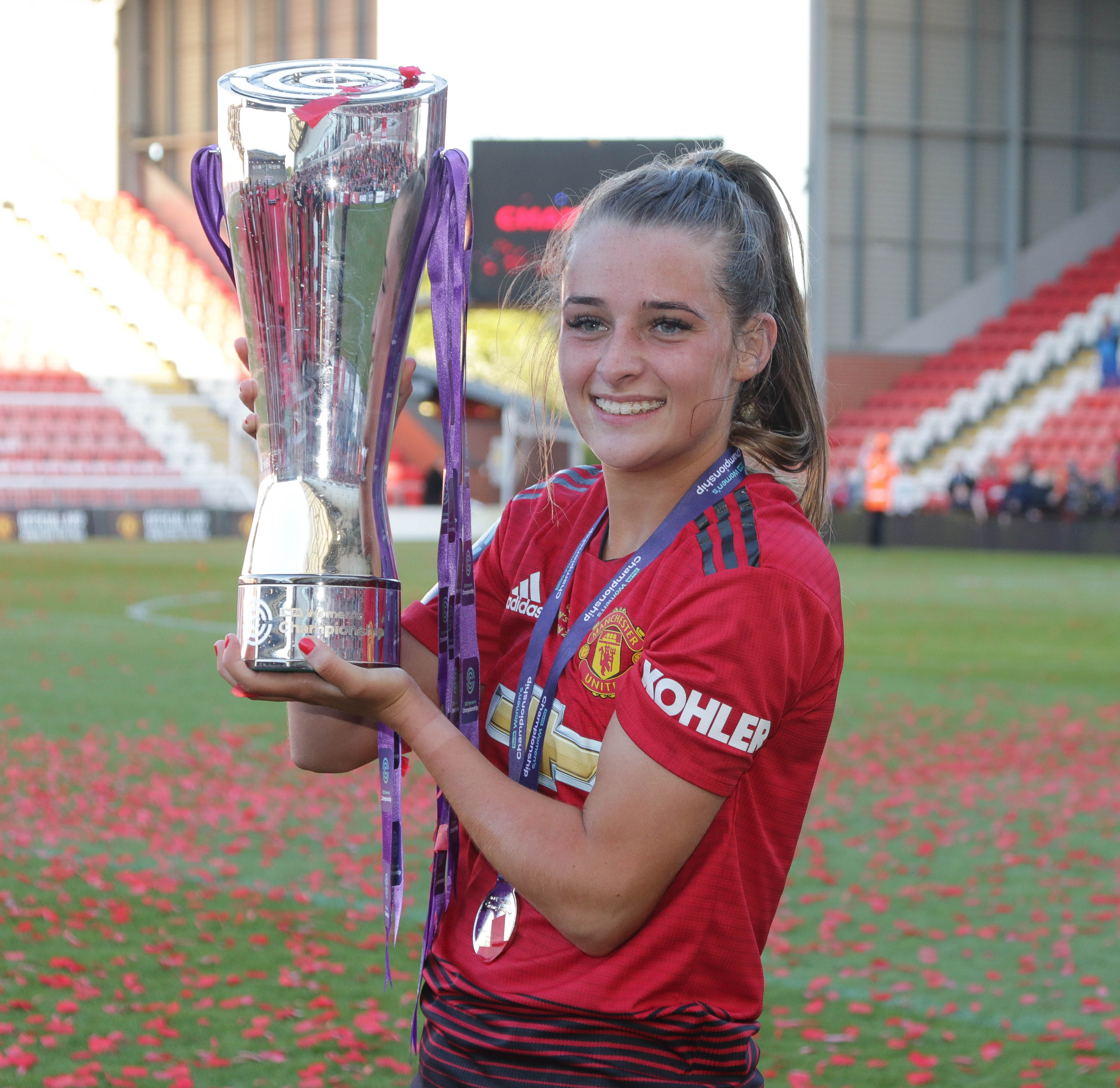 Man Utd Women 5 Lewes FC Women 0 11 05 2019-732.jpg